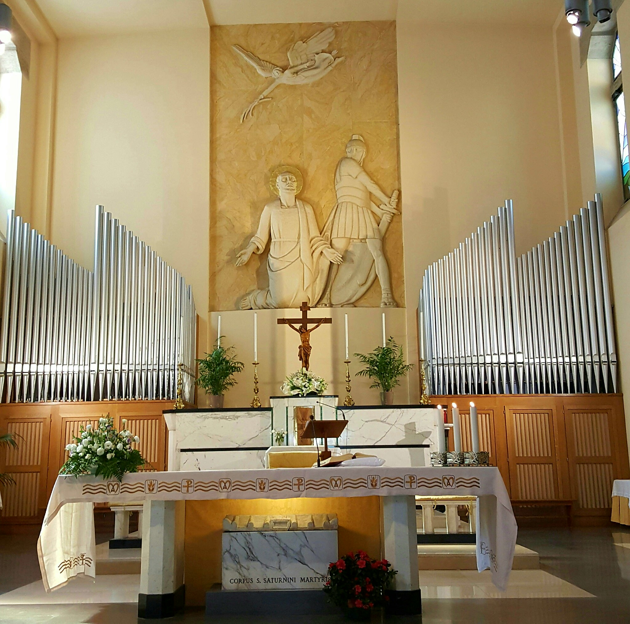 Altare della Chiesa di San Saturnino, Roma